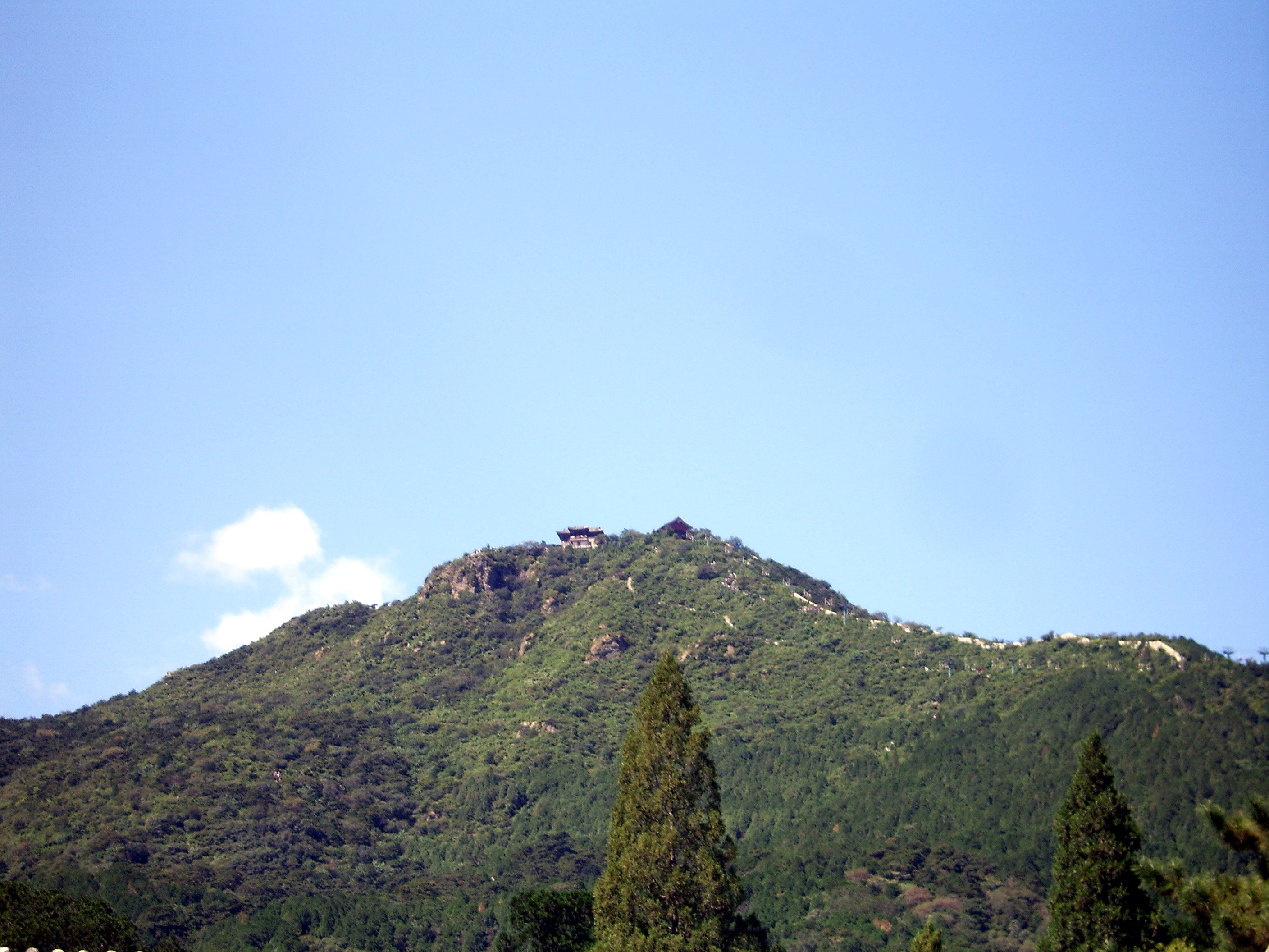 The Fragrant Hills in Beijing